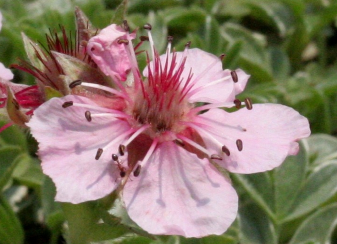 Potentilla_nitida (Cinquefoglia delle Dolomiti) Giardino Botanico Alpino "Giangio Lorenzoni" (loc. Pian Cansiglio), Tambre d'Alpago (BL), quota 1000 m s.l.m.